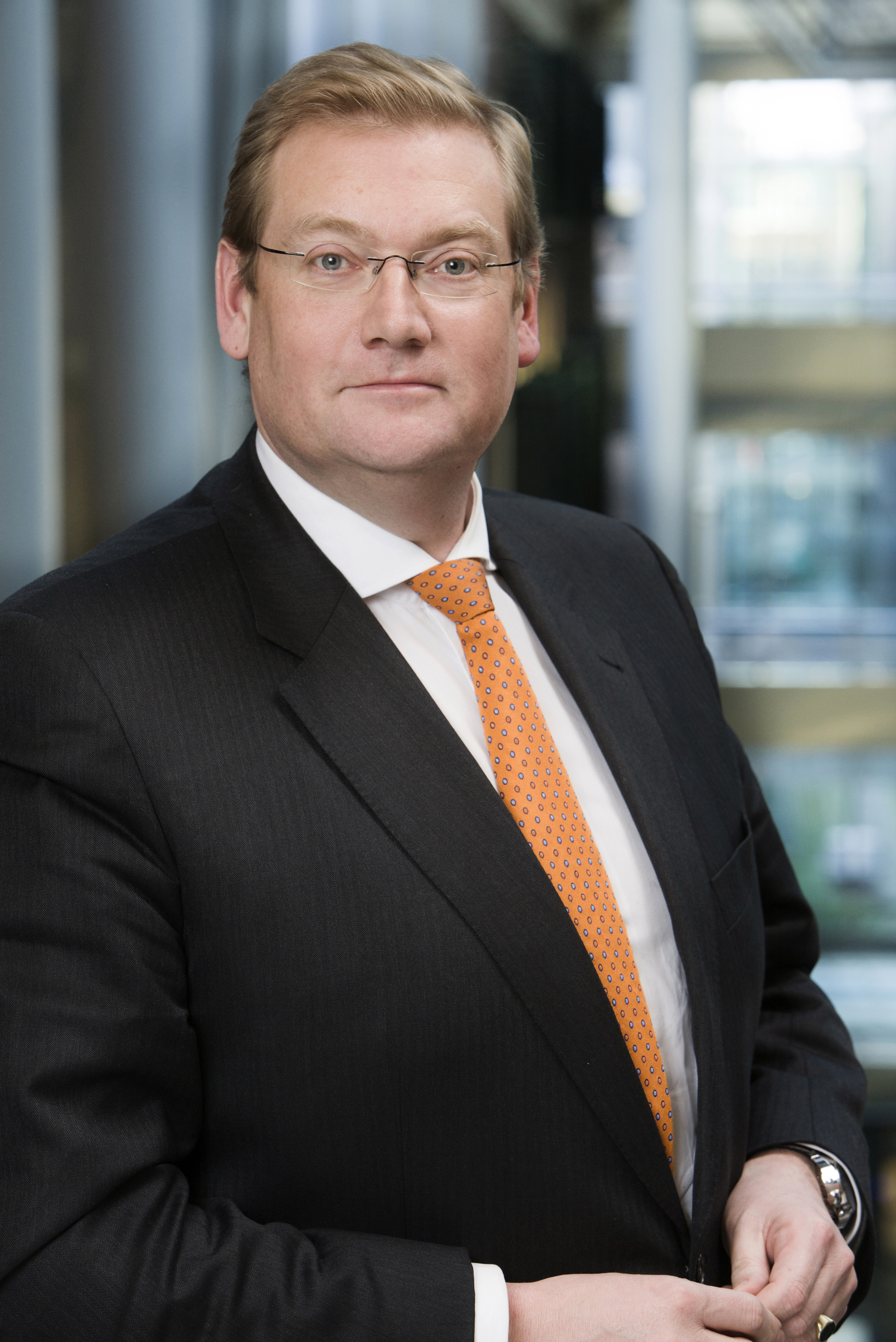 Ard van der Steur.